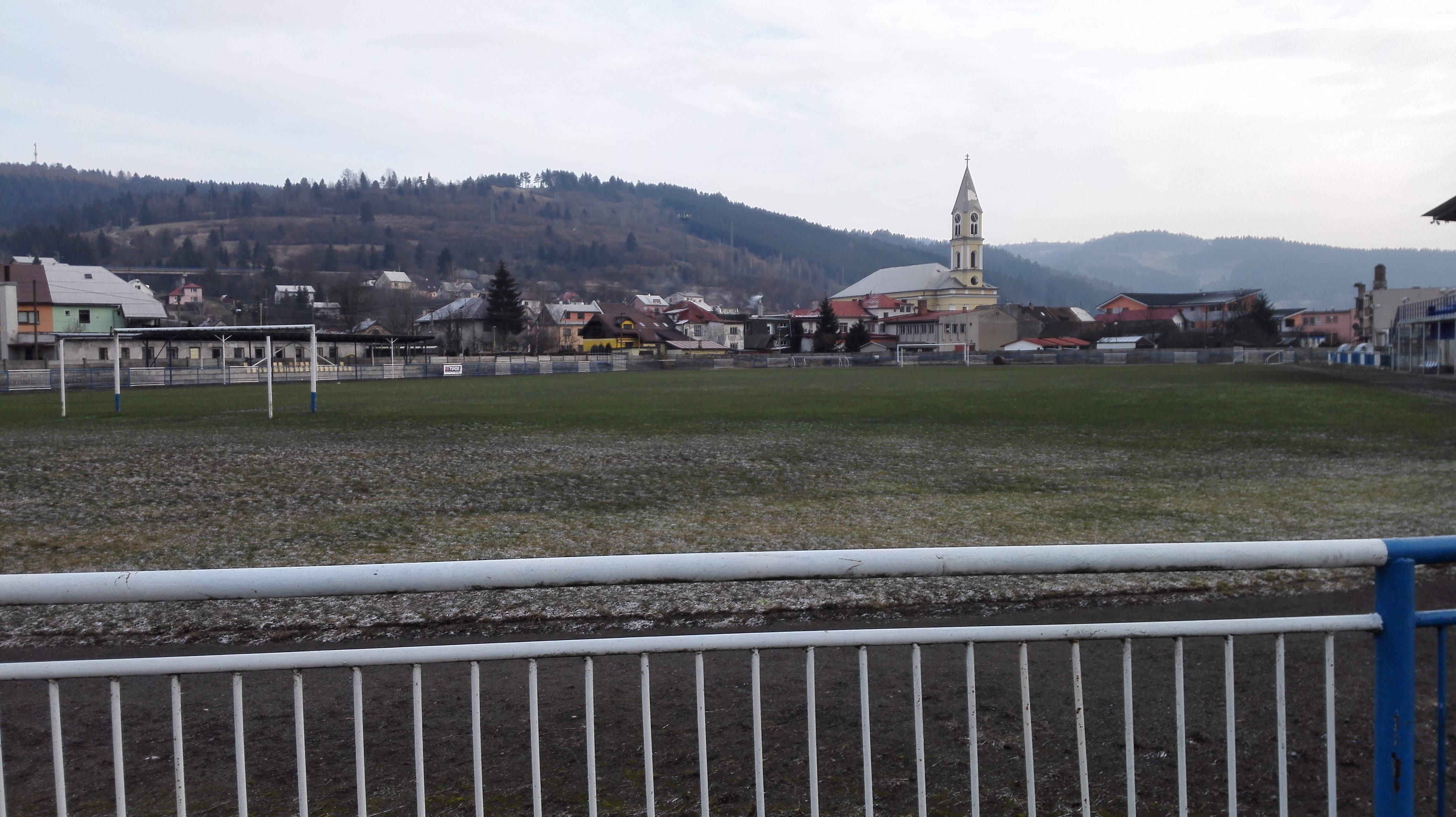 Pohľad na futbalové ihrisko a Kostol sv. Ondreja v Krásne nad Kysucou.